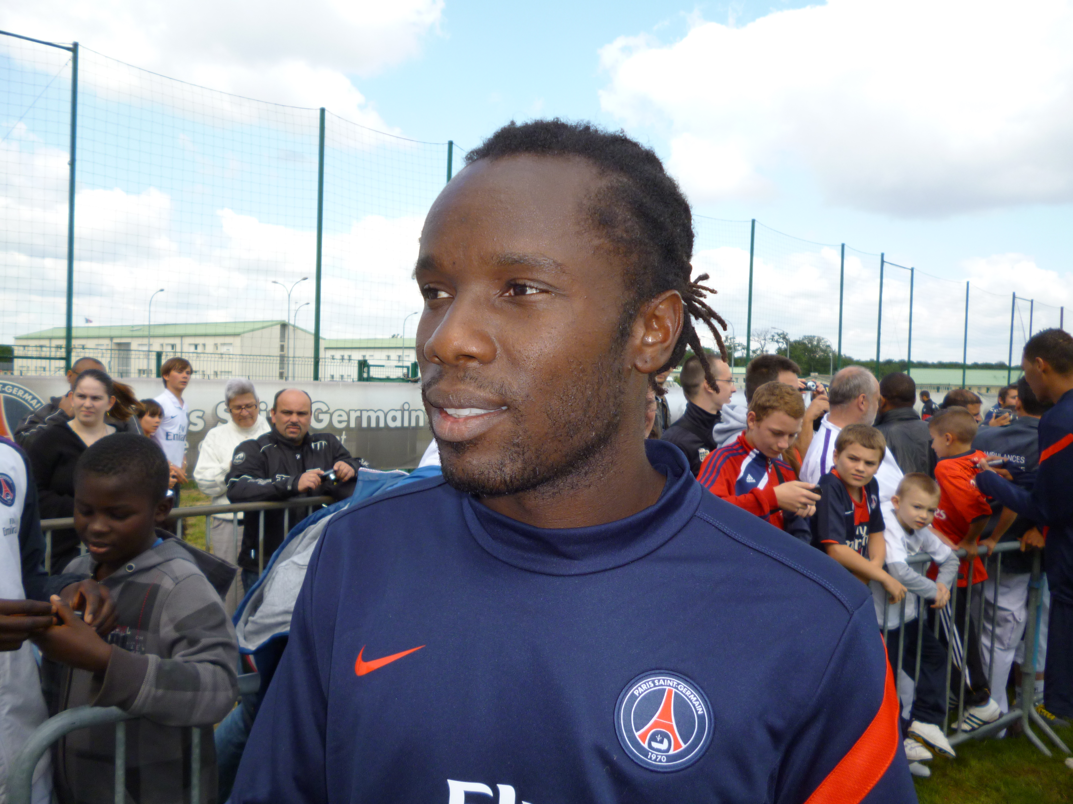 Peguy Luyindula au Camp des Loges